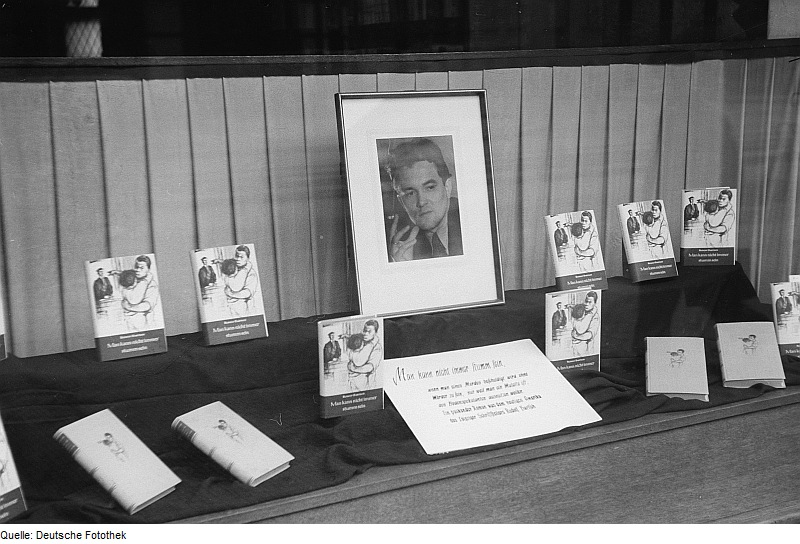 Original image description from the Deutsche Fotothek Schaufenster mit Werbung für das Buch "Man kann nicht immer stumm sein" von Rudolf Bartsch, im Zentrum dessen von den Rössings aufgenommene Portrait